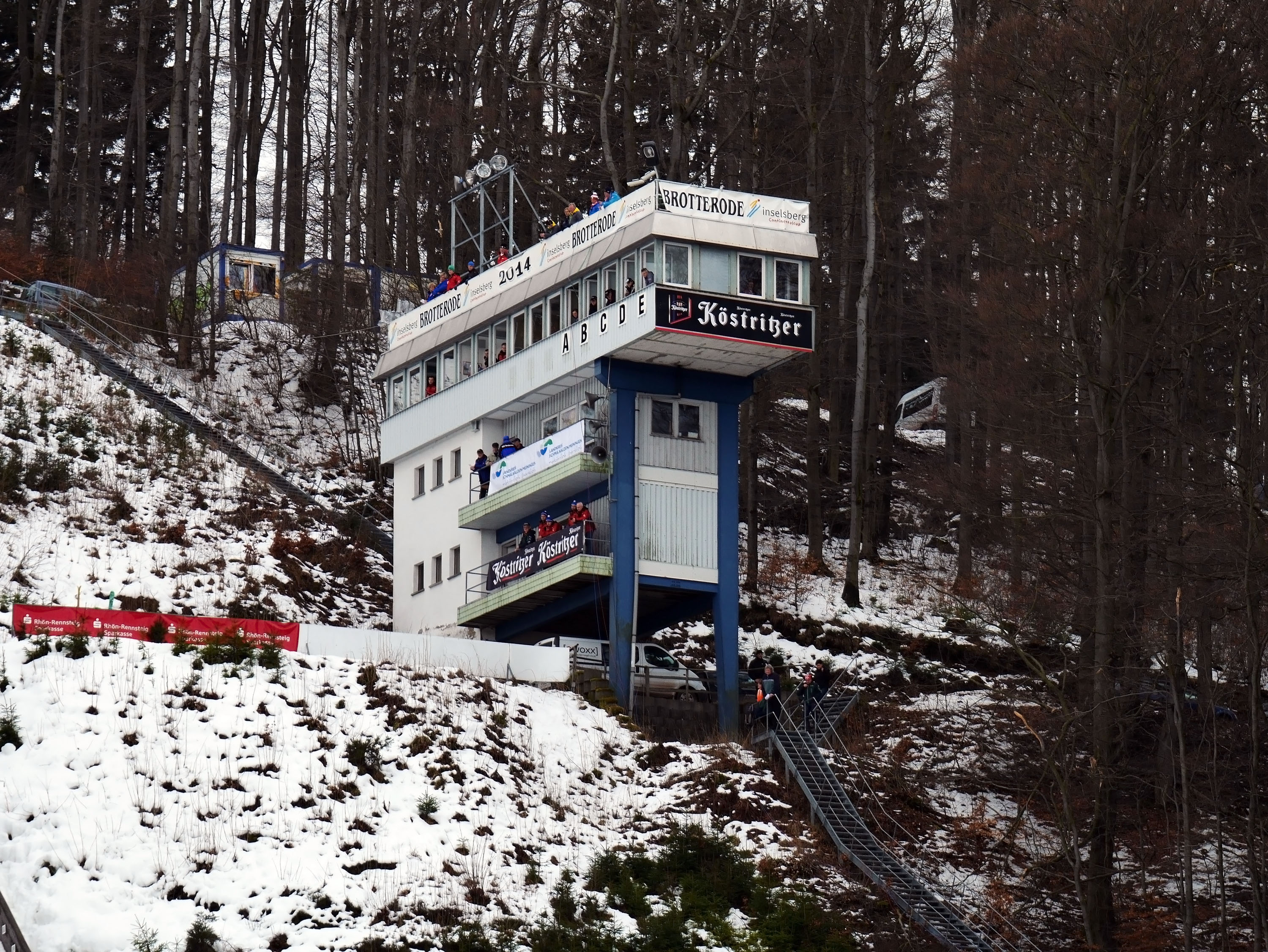 Inselbergschanze